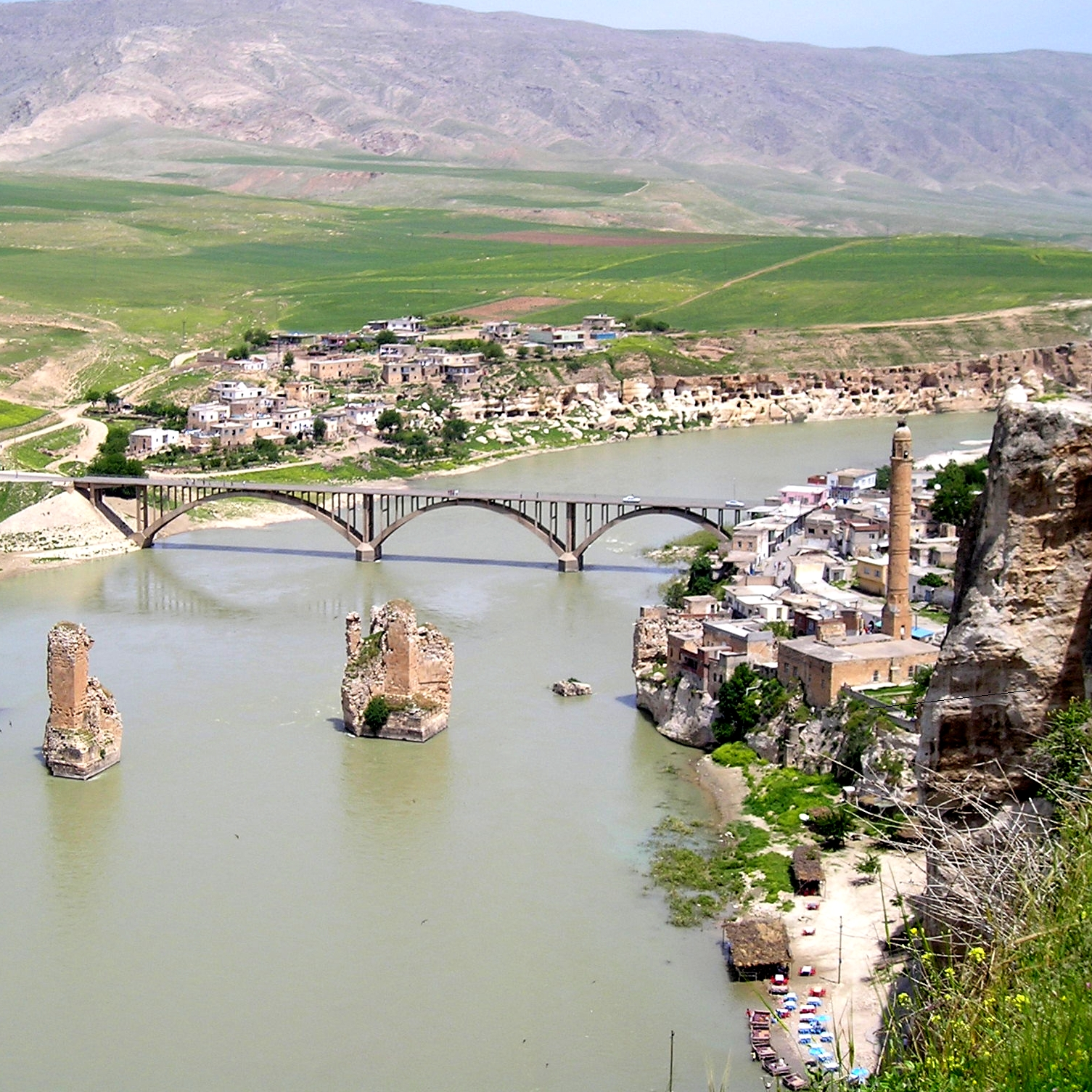 Hasankeyf o Heskîf, Turquía.